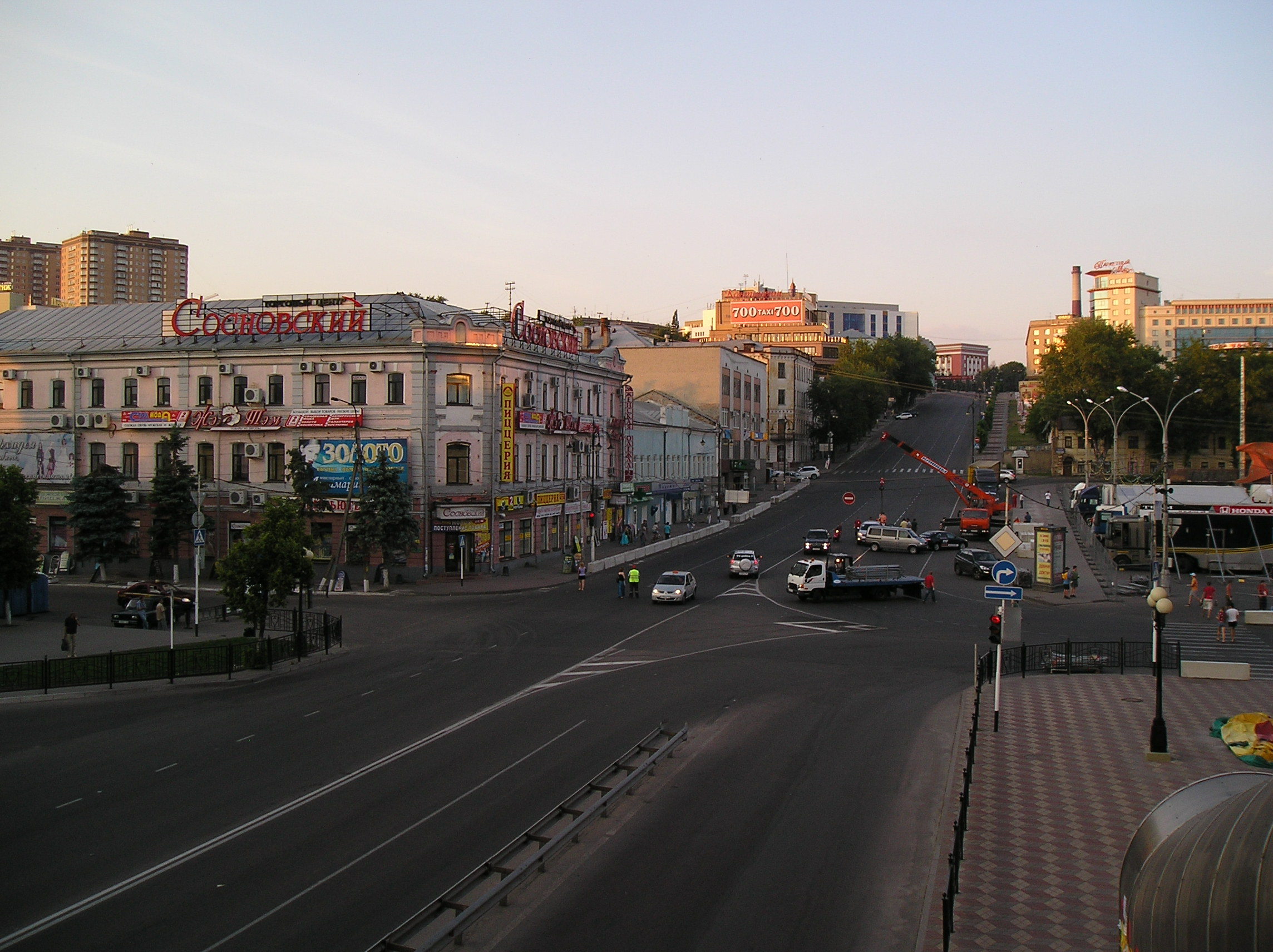 "Полугора" г. Курск